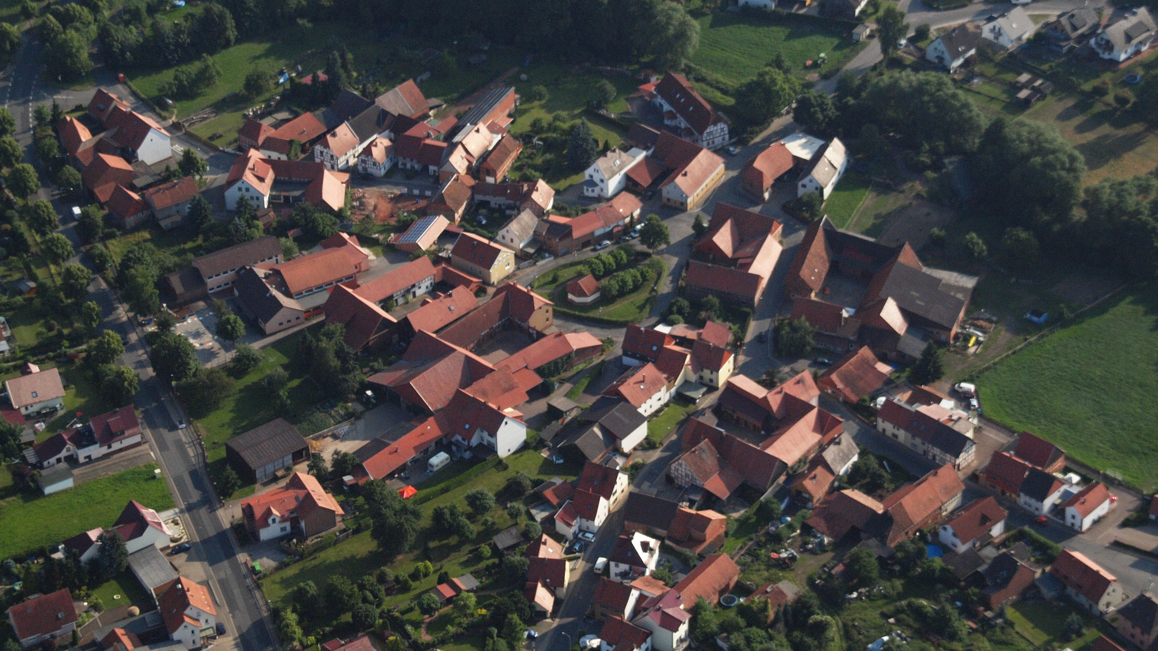 Tiftlingerode: Ortsmitte, Luftaufnahme